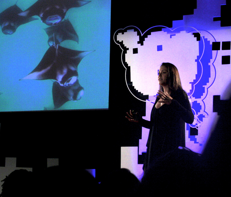 TED@Johannesburg_Andrea Marshall